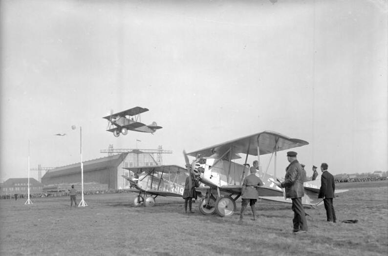 Aus dem amerikanischen Aviatic. Kampf-Flugzeug bei einem Manöverflug.